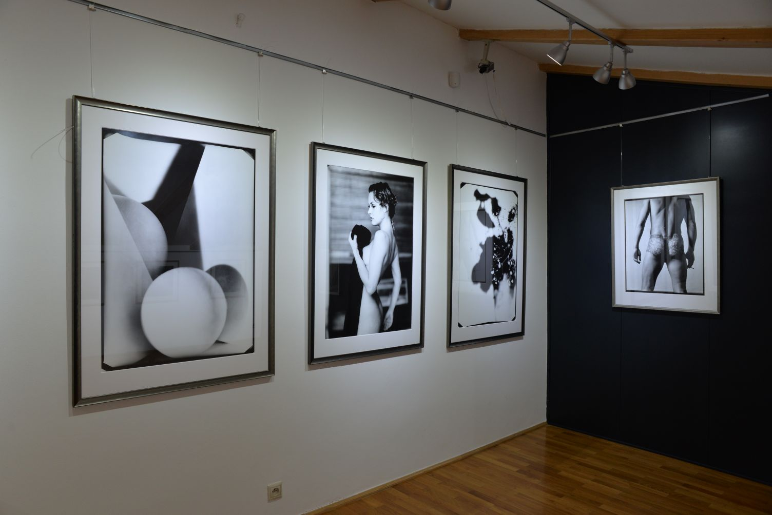 Výstava fotografií Gabiny Fárové v Lašském muzeu (květen-červen 2017)